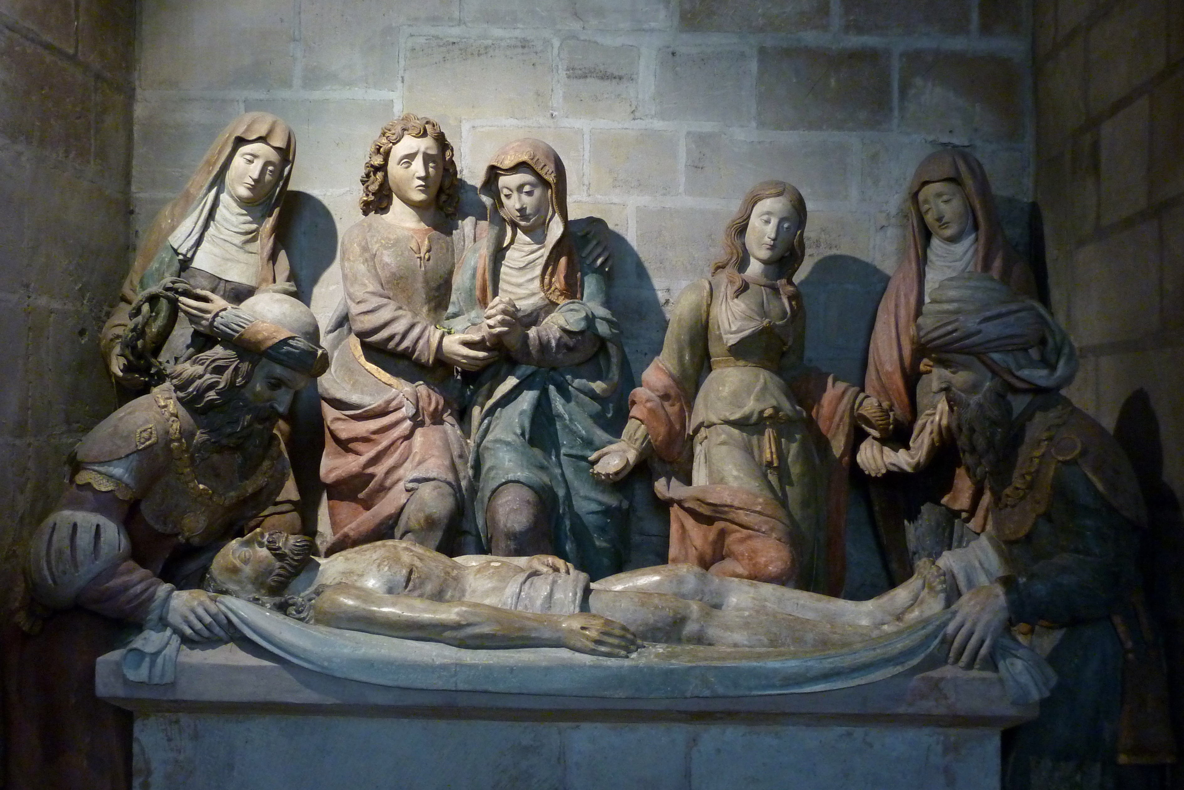 katholische Pfarrkirche Notre-Dame in Poissy, Grablegung (1522)